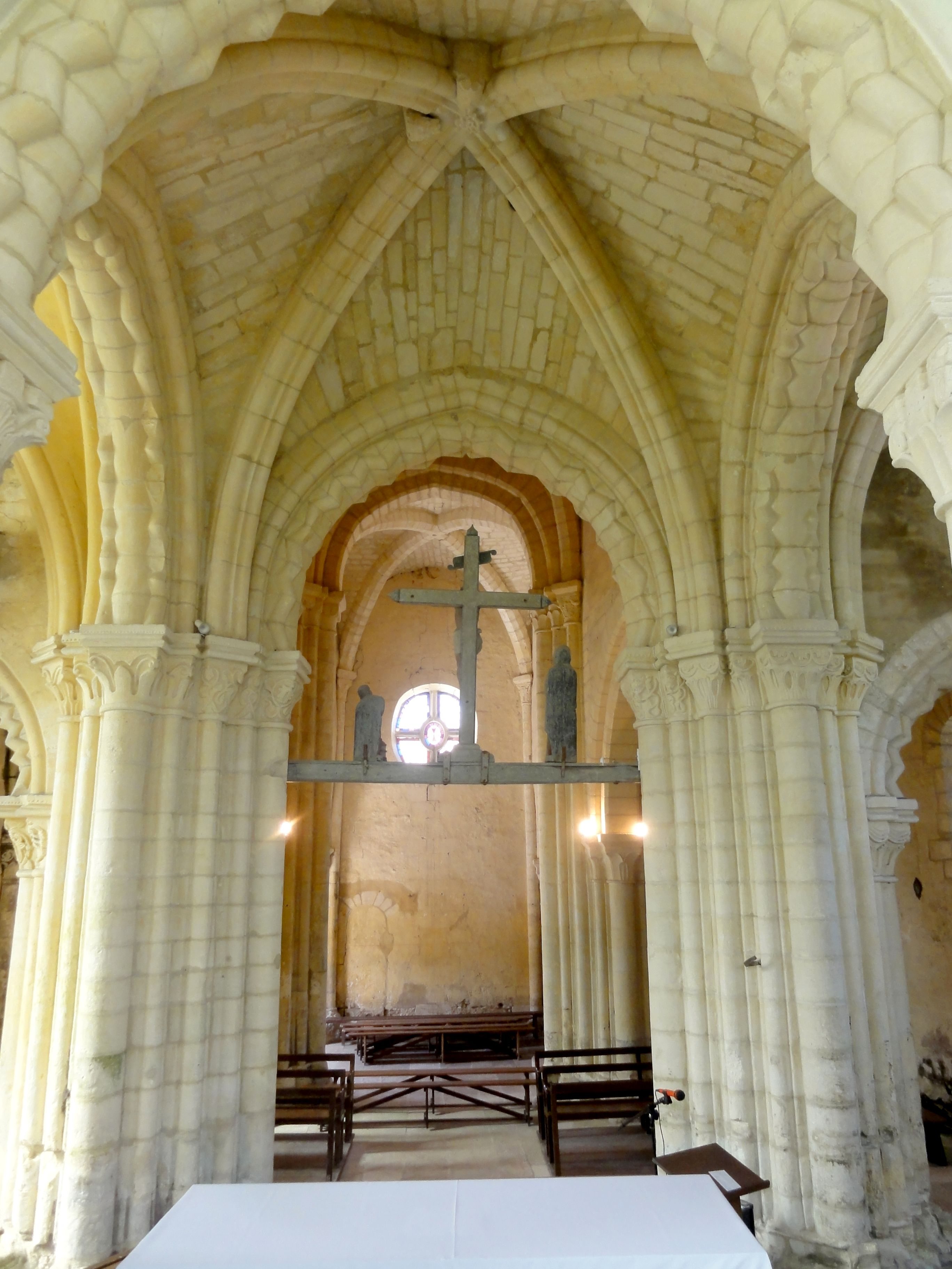 Croisée, vue vers l'ouest.